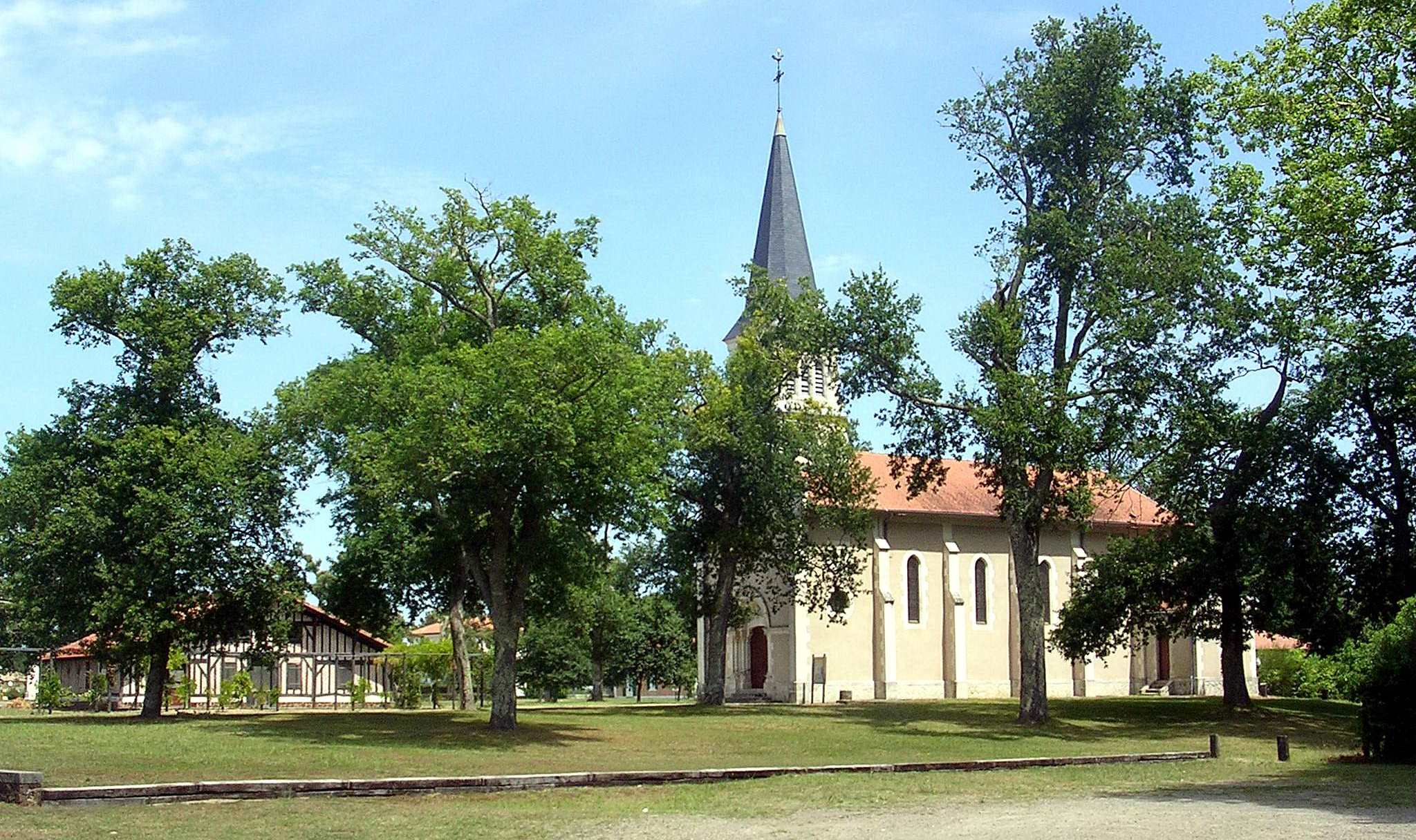 Église Saint-Michel et la Maison de l'airial de Bias, dans le département français des Landes